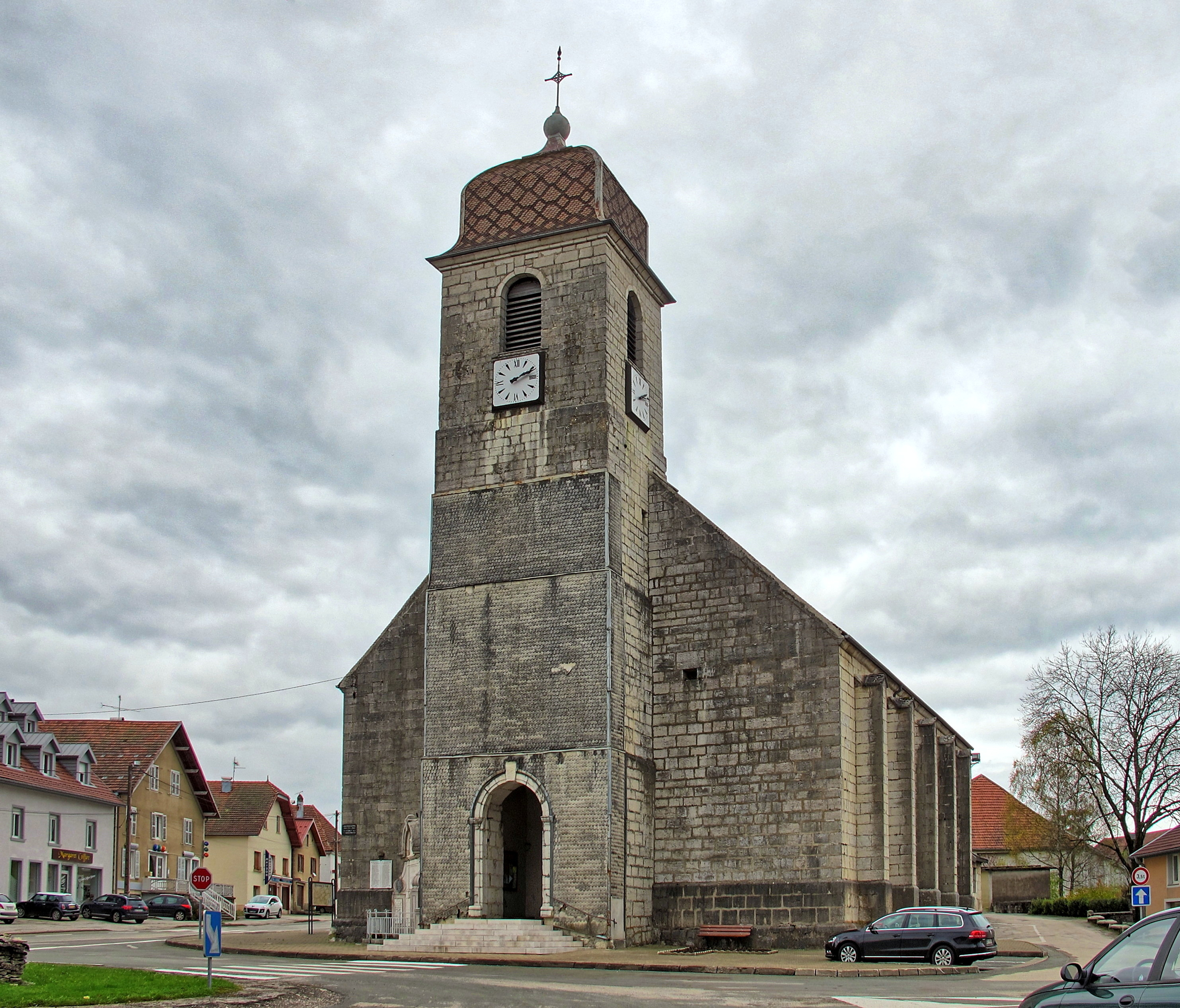 Inscrit aux monuments historiques sous le numéro PA00101781